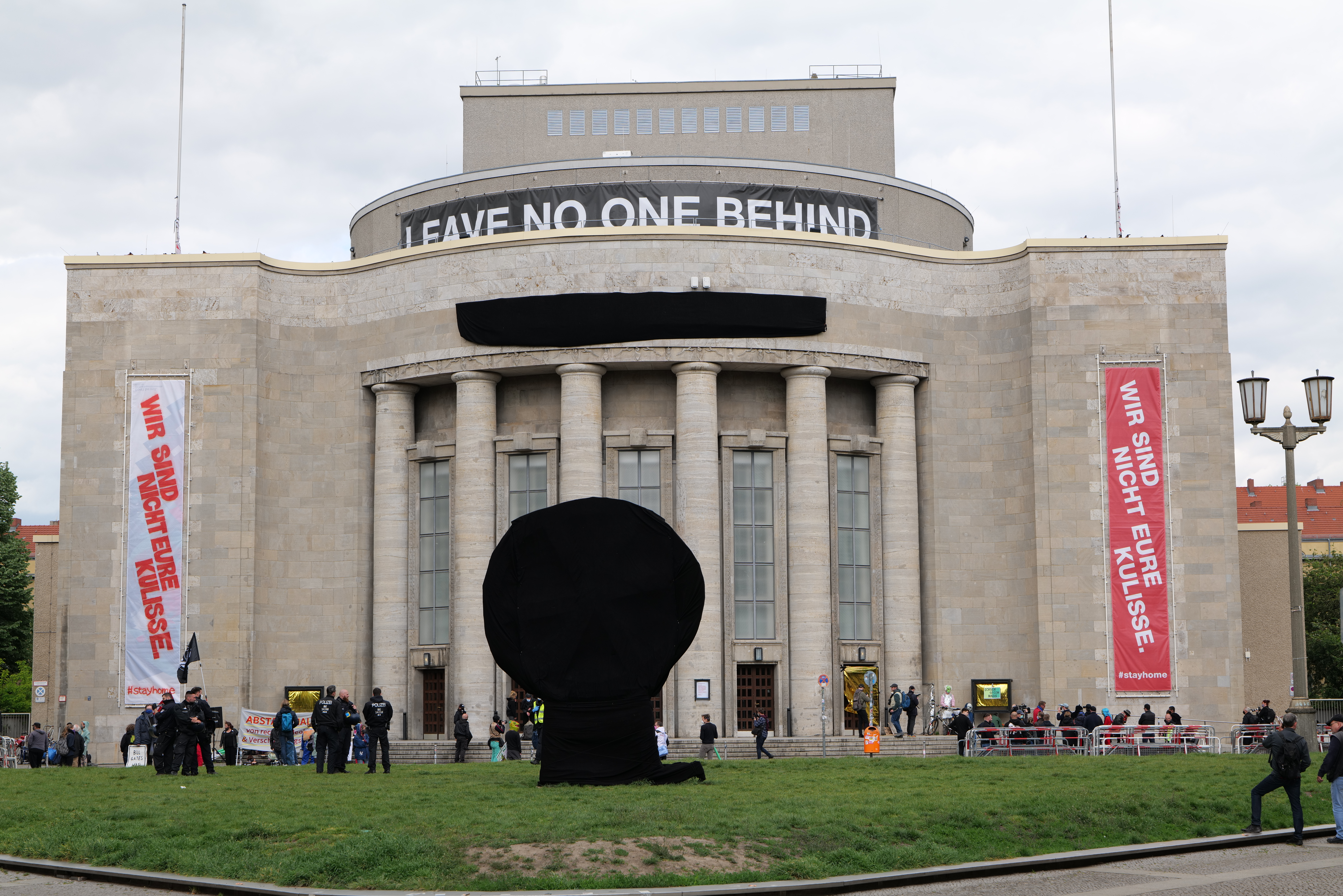 Der Alexanderplatz in Berlin während geplanten verschwörungstheoretischen Protesten mit einer Gegenkundgebung auf dem Platz am 16. Mai 2020.